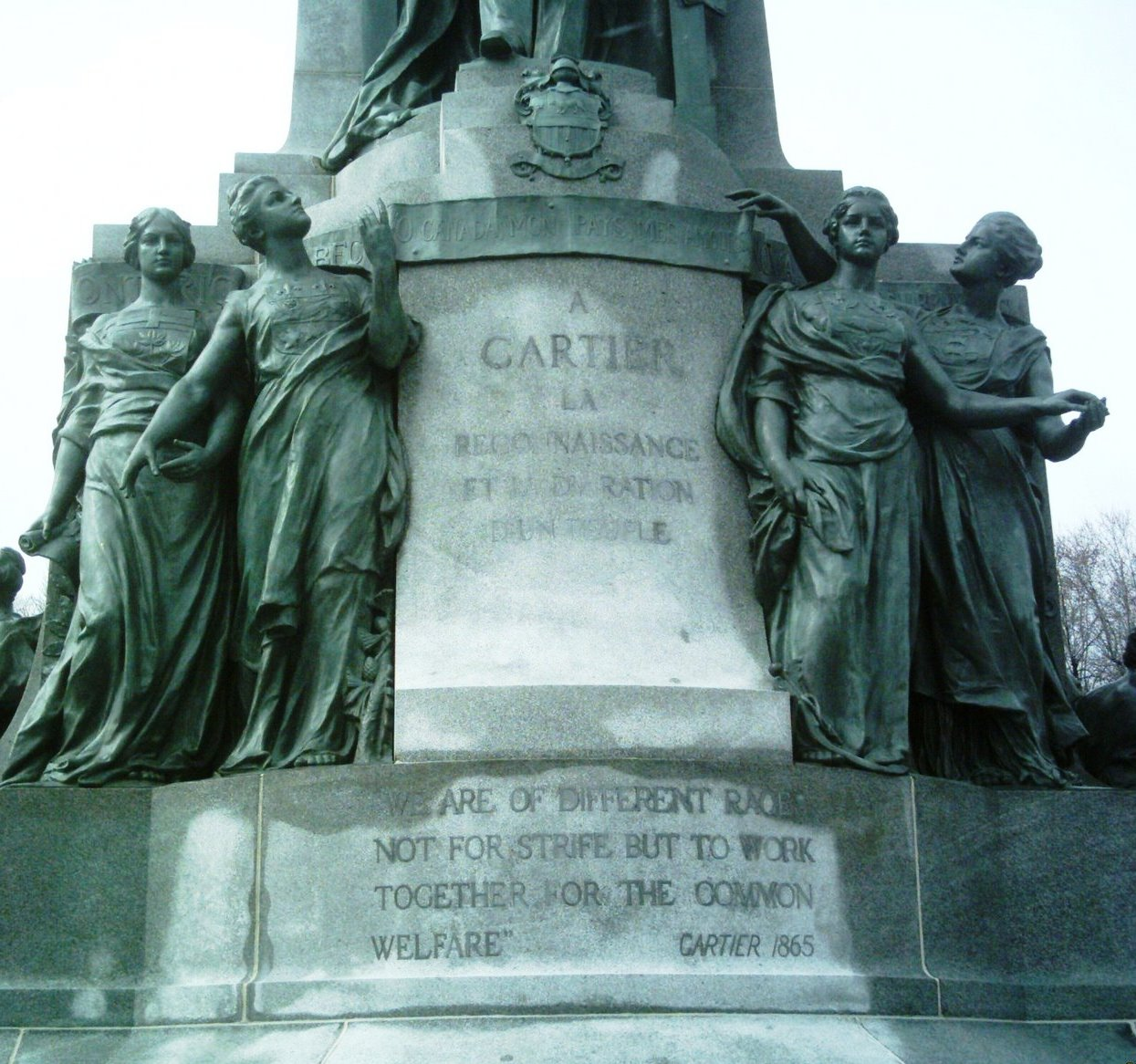 Détail du Monument à George-Étienne Cartier, côté est, en bas: les 4 premières provinces canadiennes ayant formée la confédération.